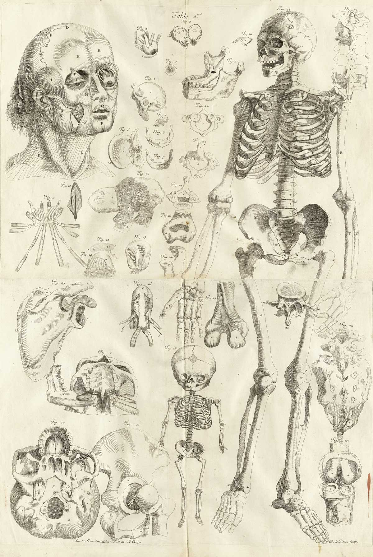 Copperplate engraving from "Nouvelles tables anatomiques: ou sont representées au naturel toutes les parties du corps humain, toutes les nouvelles découvertes, le cours de toutes les humeurs, les lieux où elles deposent leurs excrements: on y à joint un petit livre qui en fait la description et en explique clairement les usages avec ordre et un peu de mots / le tout dessiné et composé par Amé Bourdon, medecin." Cambrai/Paris:Laurens D'Houry, 1678. Original size 55 cm.